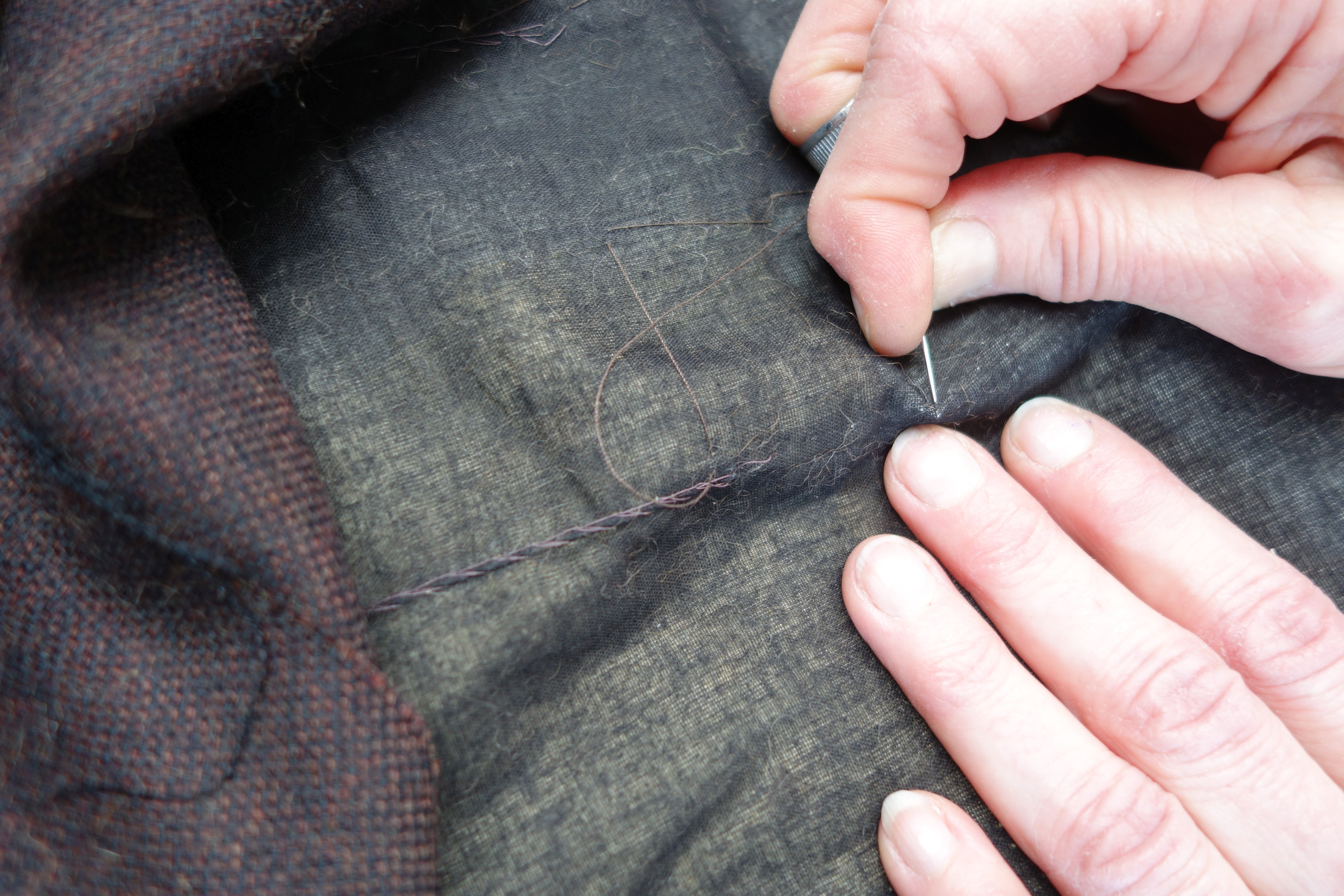 Links Pikiernaht der Pikiermaschine, rechts Handpikieren. Gesehen m Atelier der Firma Halfmann Pelzmanufaktur GmbH., Düsseldorf-Oberkassel.